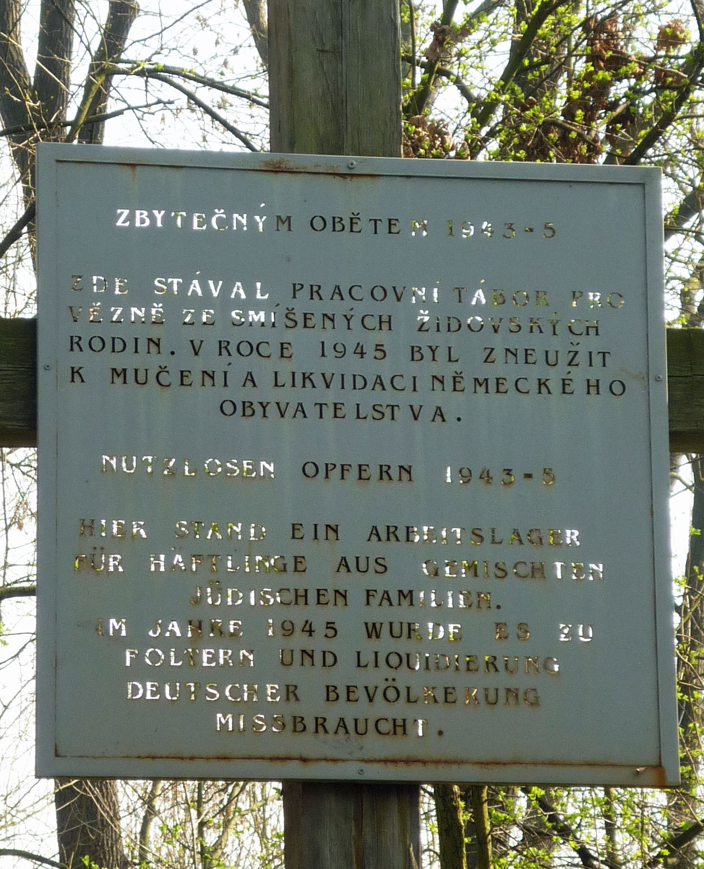 Gedenkkreuz mit Erinnerungstafel an die Ermordnung deutscher Opfer im Jahr 1945 im Lewanitzer Fasanengarten, errichtet 2010 (Levonice bei Postoloprty), mit folgendem Text: Nutzlosen Opfern 1943-45 Hier stand ein Arbeitslager für Häftlinge aus gemischten jüdischen Familien. Im Jahre 1945 wurde es zu Foltern und Liquidierung deutscher Bevölkerung missbraucht.